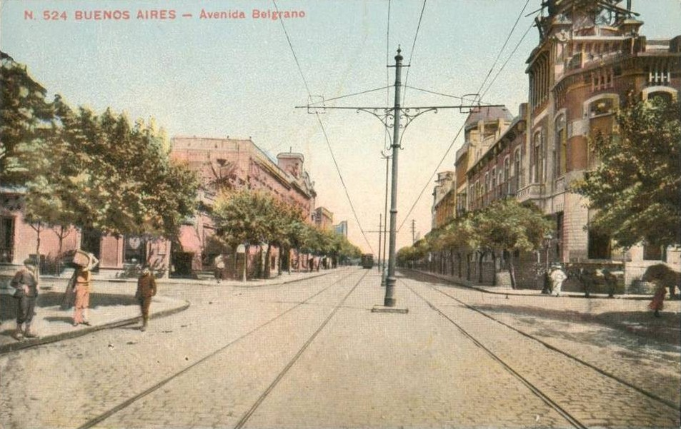 Vista de la Avenida Belgrano desde la calle Dean Funes mirando hacia el oeste, en Buenos Aires. A la derecha se destaca en construcción el edificio del Hospital Español diseñado por el arquitecto Julián García Núñez y terminado hacia 1908.